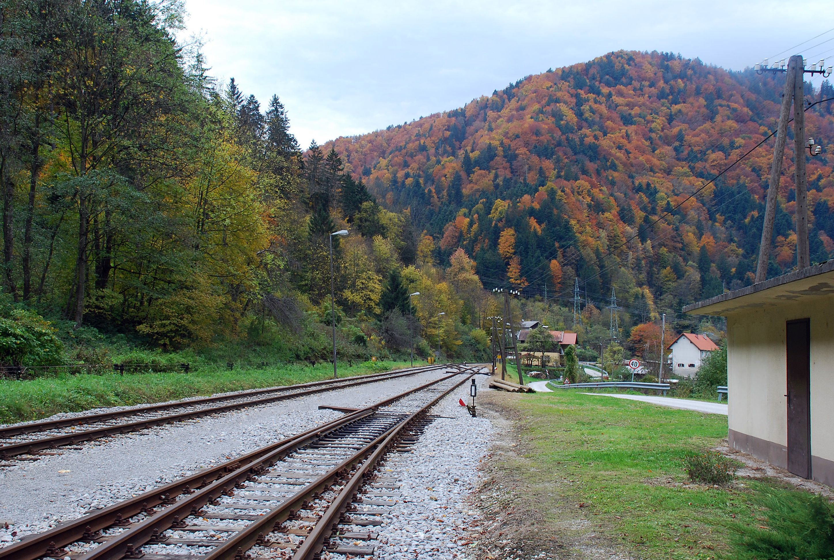 Railway Station Ruta, Lovrenc na Pohorju, Slovenija (St. Lorenzen an der Kärntner Bahn, Drautalbahn)